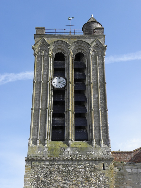 Beffroi du clocher de la collégiale Saint-Martin de Champeaux (77).